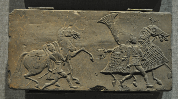 邓州南朝画像砖